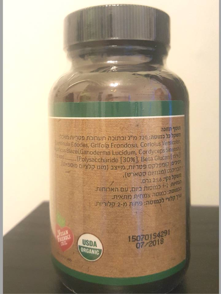 תוסף תזונה המכיל פטריות מרפא